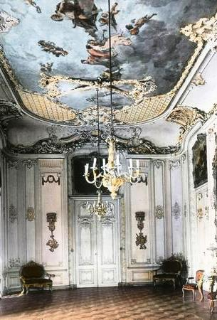 t